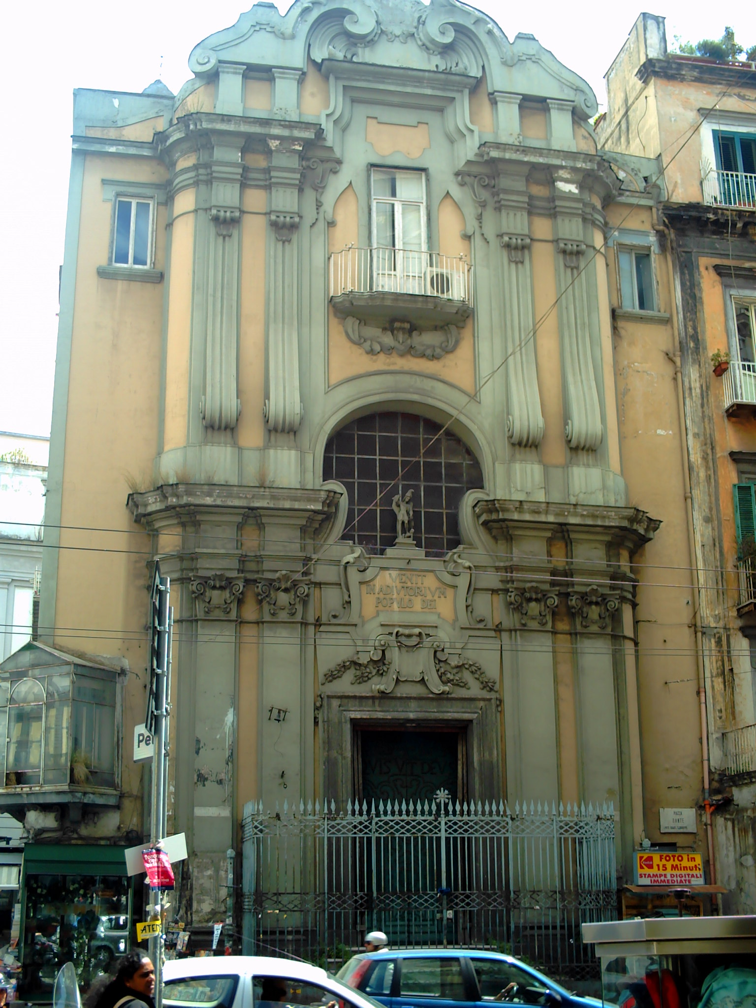 Facciata San Michele Aracangelo